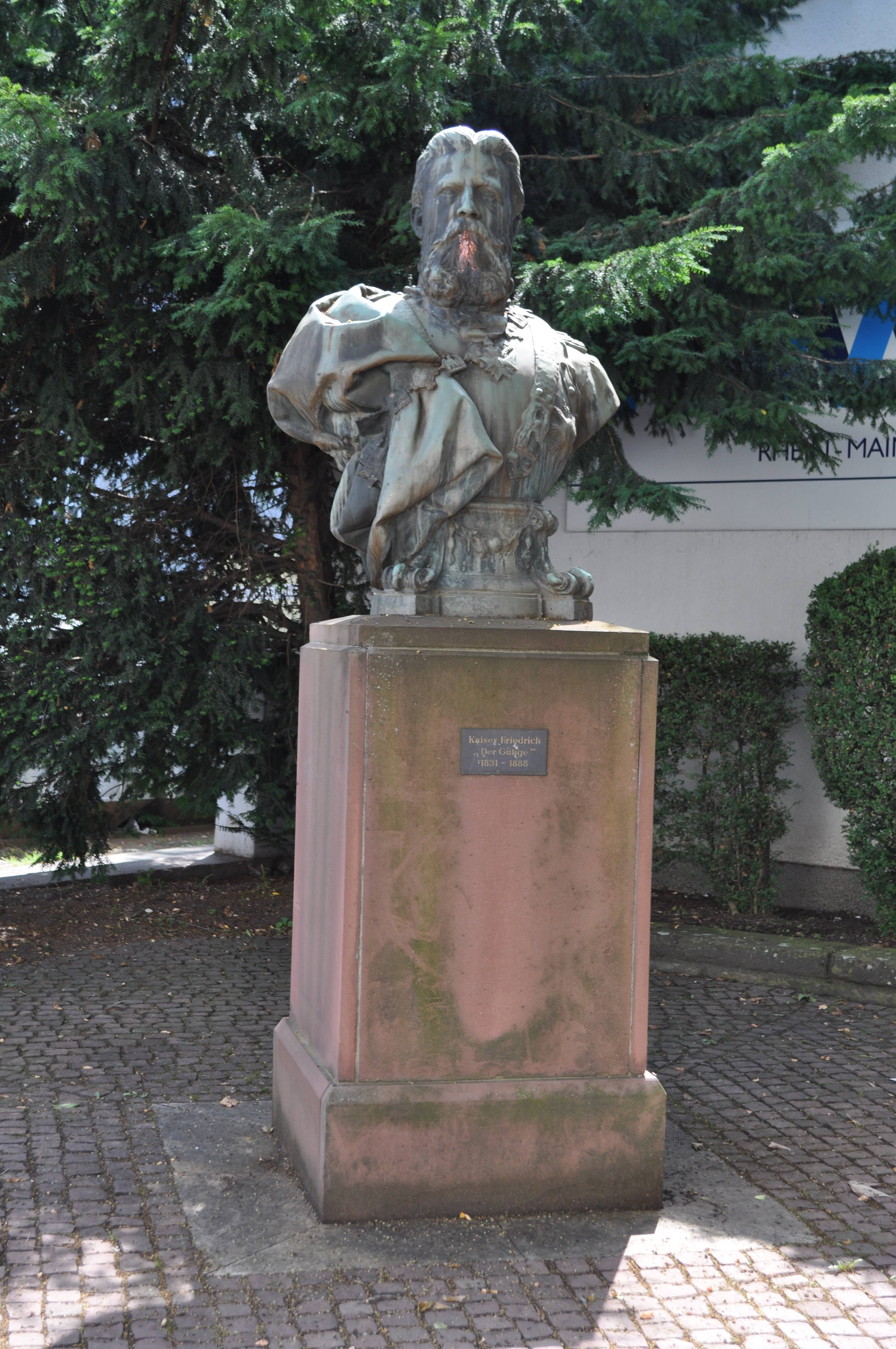 Offenbach, Büste Kaiser Friedrich III, Ecke Ludwigstraße-Geleitsstraße.